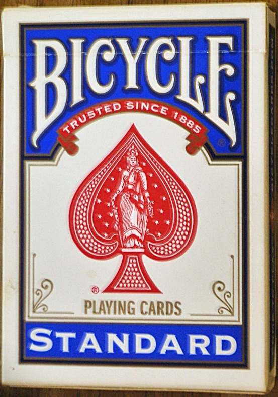 USPCのBICYCLE